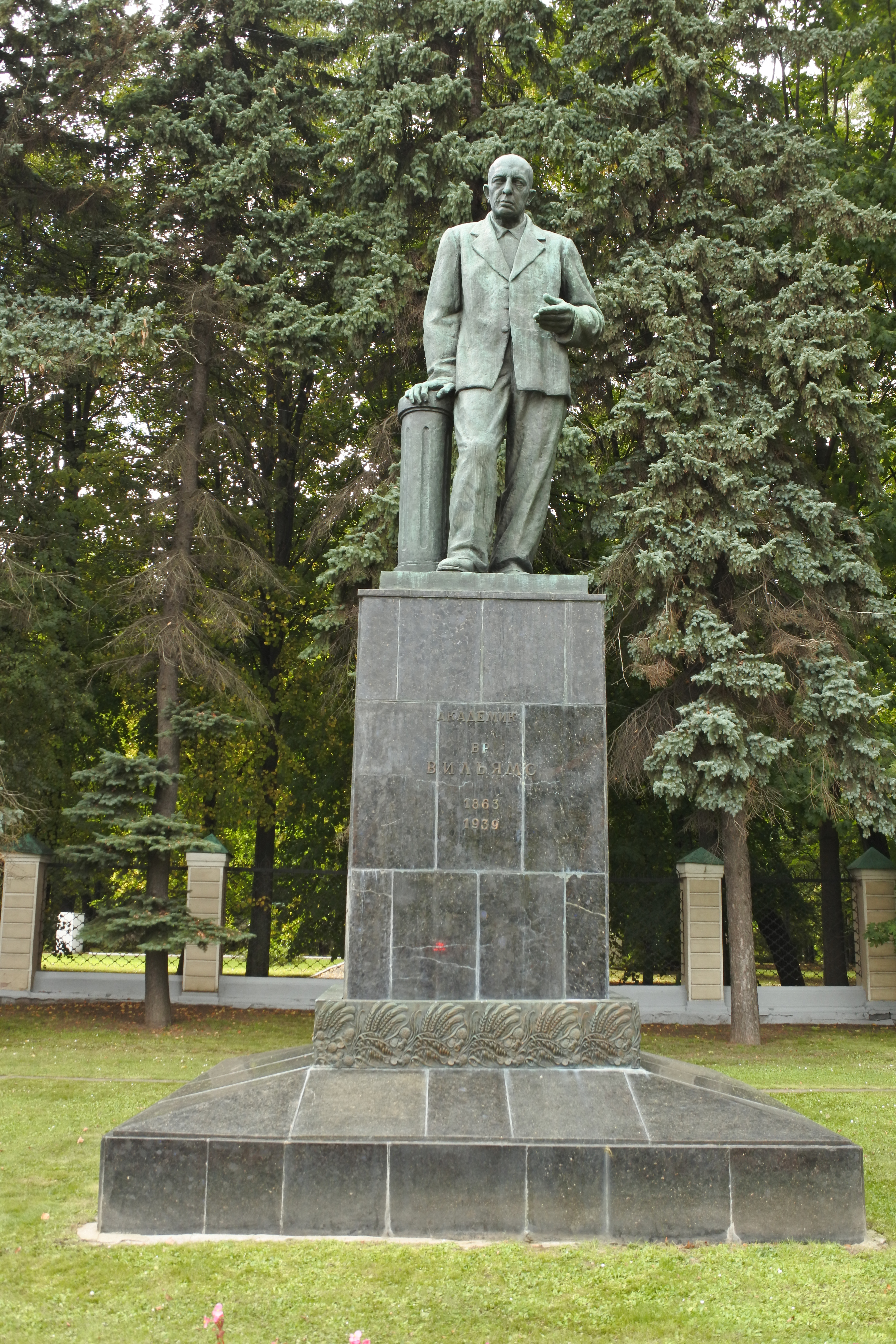 Бюст В.Р.Вильямса: Тимирязевская ул., д.49, Тимирязевский, Северный округ, Москва